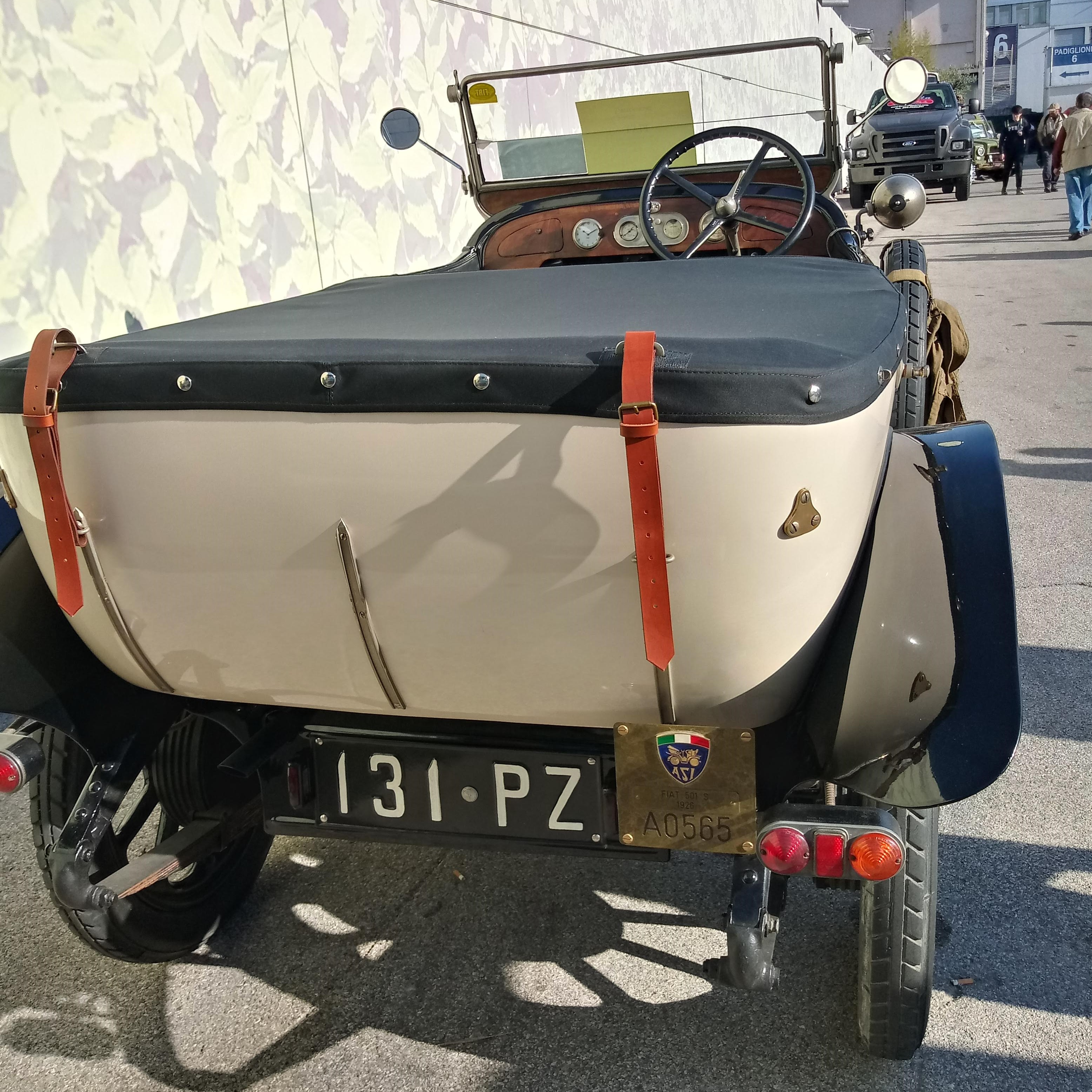 La foto rappresenta la targa posteriore su una linea visibile su una Fiat 501 S del 1927 della provincia di Potenza. Scattata nello spazio adiacente ai padiglioni di "Auto e moto d'epoca" in fiera a Padova.